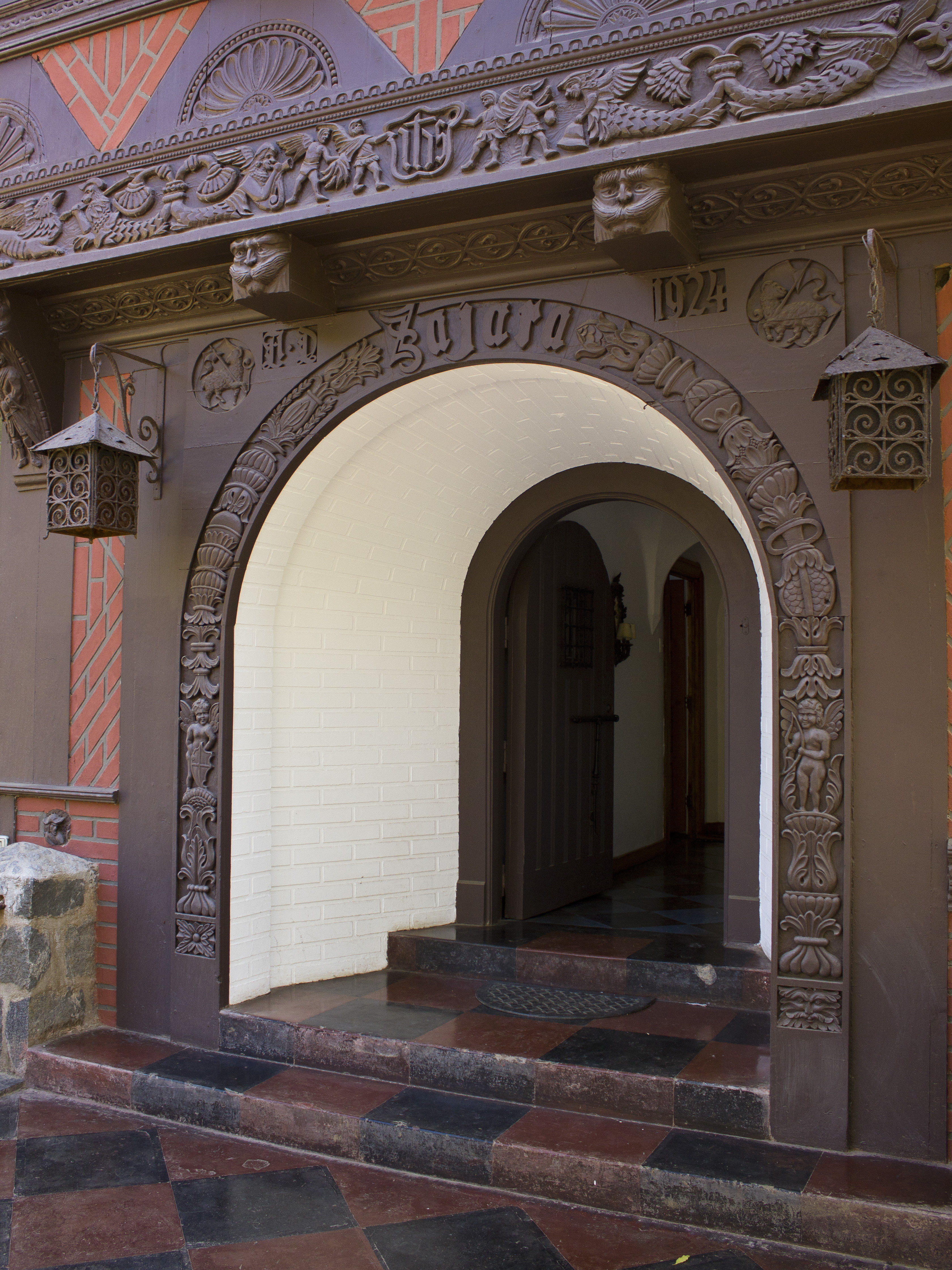 Casa Hildesheim Baviera en Zapallar. Edificada 1924. Arquitecto Josué Smith Solar. Réplica de la Knochenhaueramtshaus, casa ubicada en la ciudad de Hildesheim, Baja Sajonia, Alemania. Monumento Histórico. This is a photo of a national monument in Chile: 1148